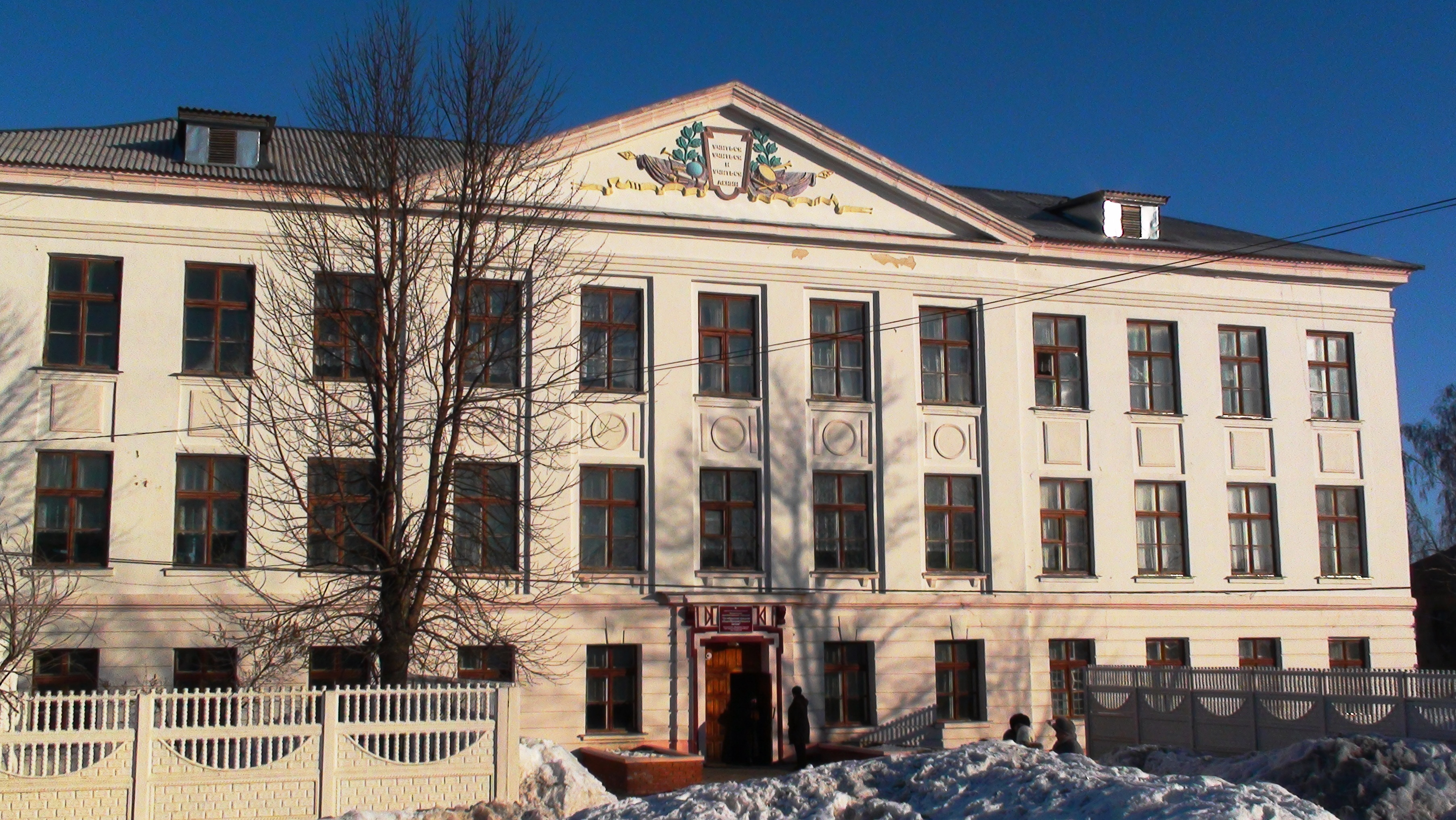 Школа микрорайона Октябрьский г.Скопина